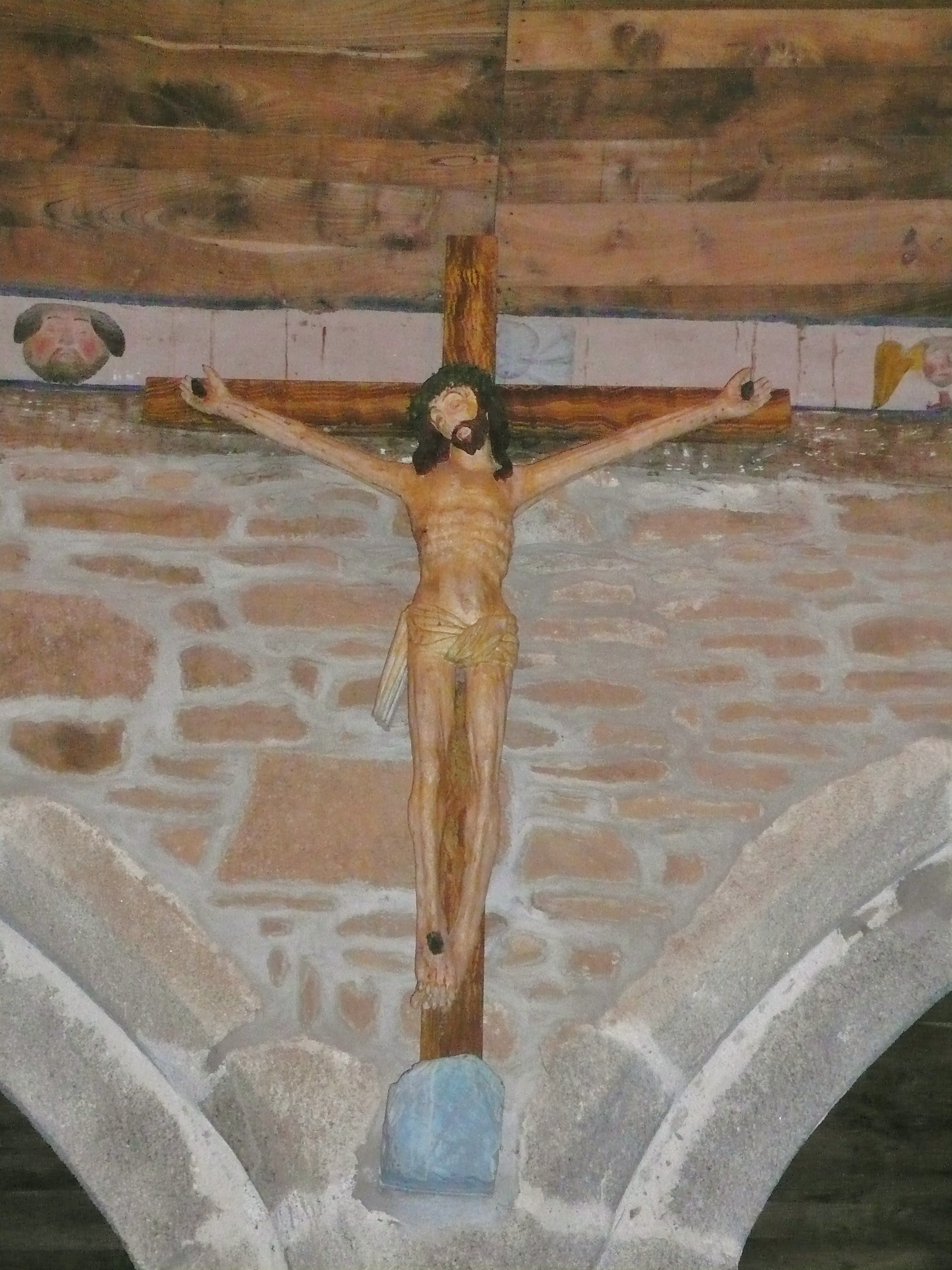 Christ en croix dit « Christ jaune », dans la chapelle Notre-Dame de Trémalo en Nizon, commune de Pont-Aven, Finistère, Bretagne, France. Il servit de modèle à Gauguin pour son tableau éponyme.